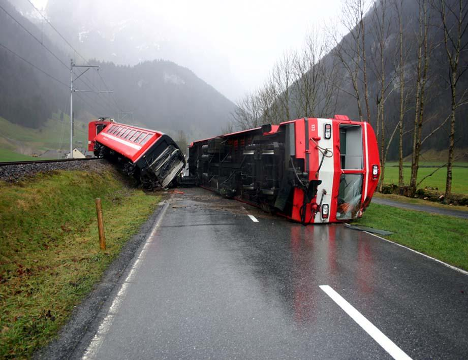 Am 19. Januar 2007 wurde eine von Wasserauen kommende Zugskomposition der Appenzeller Bahnen durch einen heftigen Sturm kurz nach Bahnhof aus den Schienen geworfen. Dabei kippte der Steuerwagen ABt 133 auf die Hauptstrasse Schwende–Wasserauen. Der mittlere Wagen geriet in Schieflage, der schwere Triebwagen BDe 4/4 33 blieb auf den Schienen.